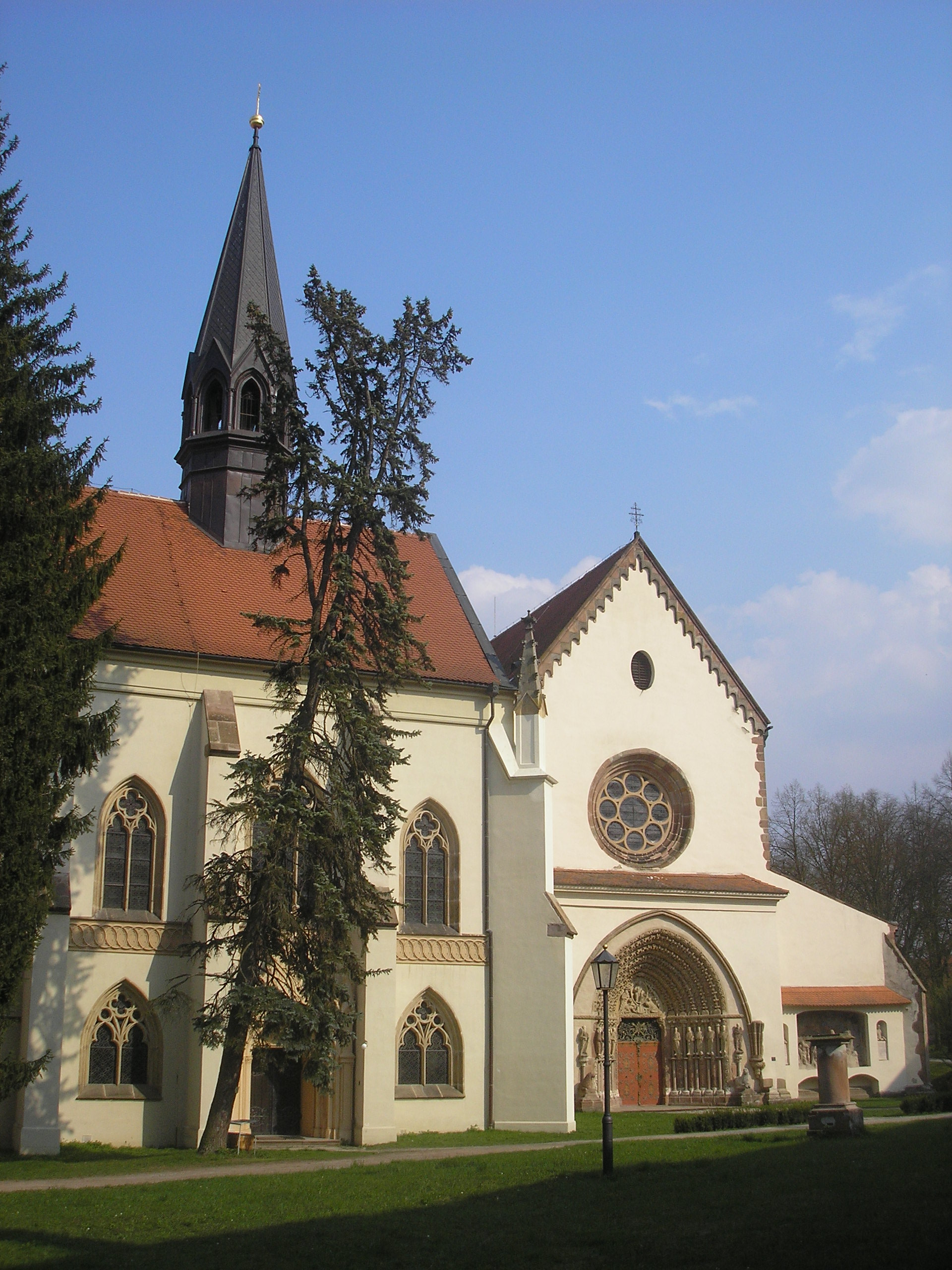 Kloster Porta Coeli